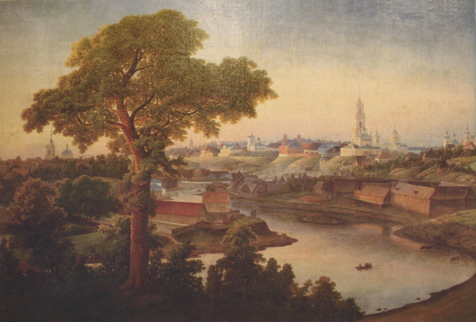 Вид на Ржев. Волосков. 1856 год. Хранится в Ржевском краеведческом музее. На картине изображена панорама Князь-Федоровской (Советской) стороны Ржева, видны Тетеринская слобода, Успенский собор и далее берег Князь-Федоровской стороны.